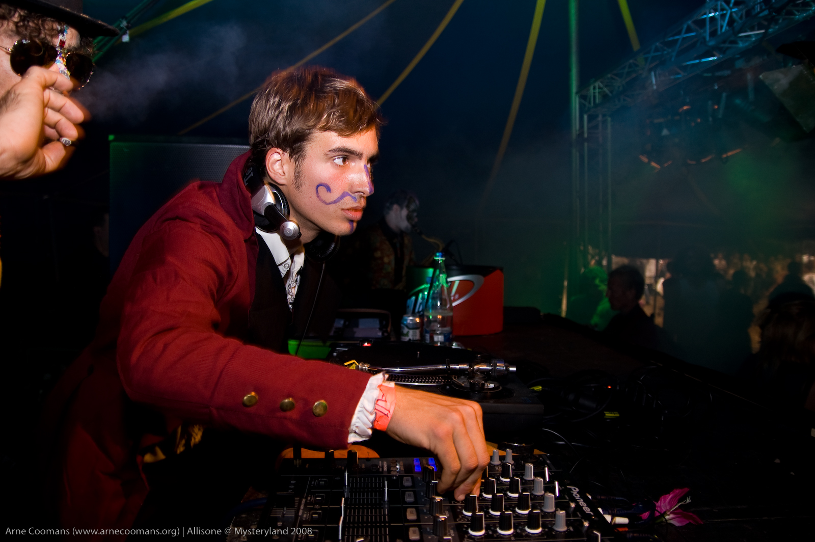 Egbert Jan Weeber @ Mysteryland 2008